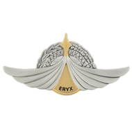 Badge de qualification de tireur ERYX de l'armée de terre française.